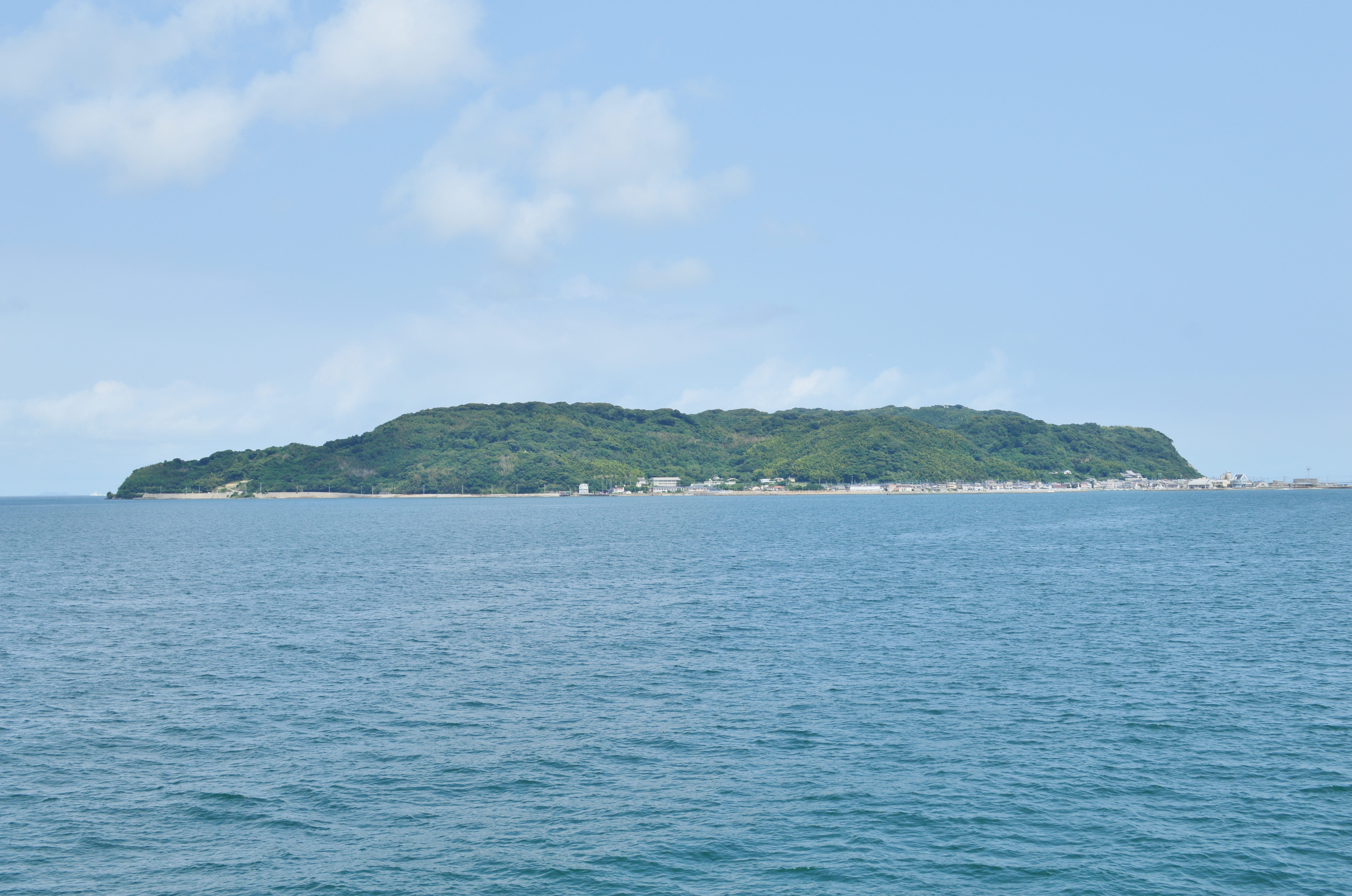 志賀島 遠景